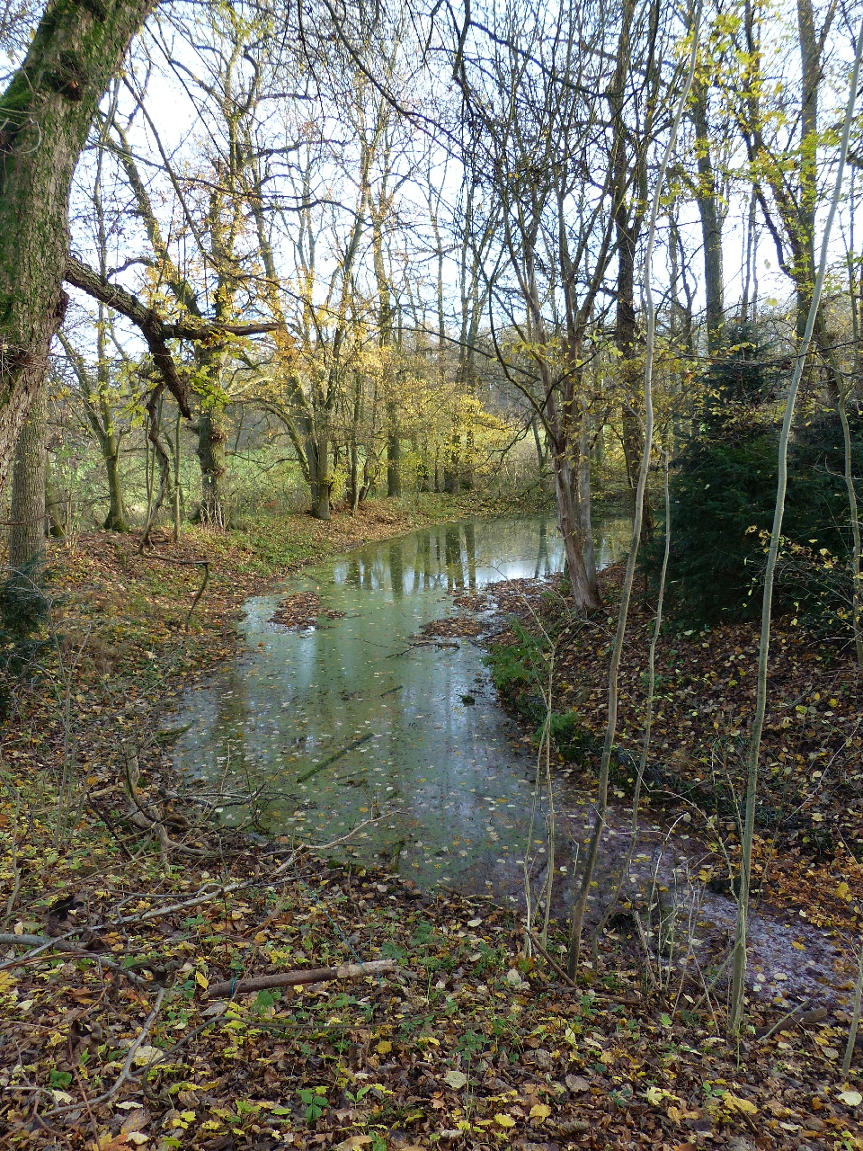 Der nördliche Teil des Burggrabens, Blickrichtung Südosten.